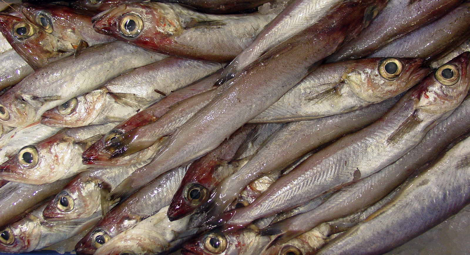 Bacaladilla. Pez osteíctio de los gádidos